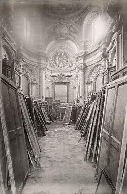 Chiesa distrutta di San Bartolomeo dei Vaccinari o di Santo Stefano de Arenula